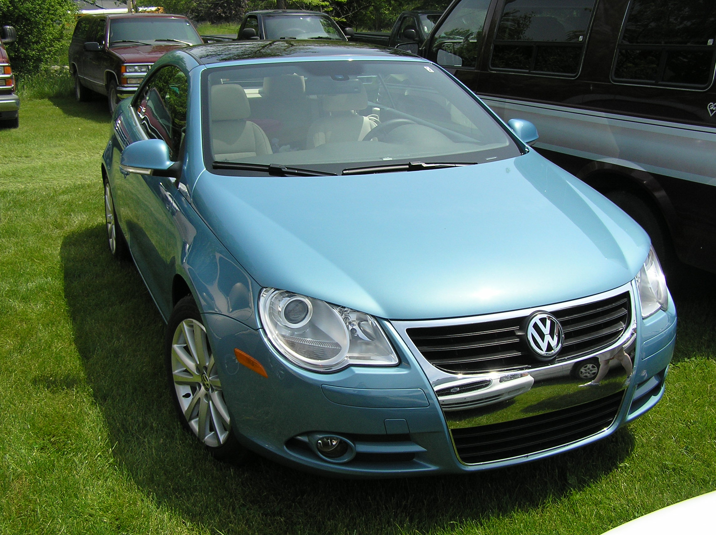 2006 VW Eos